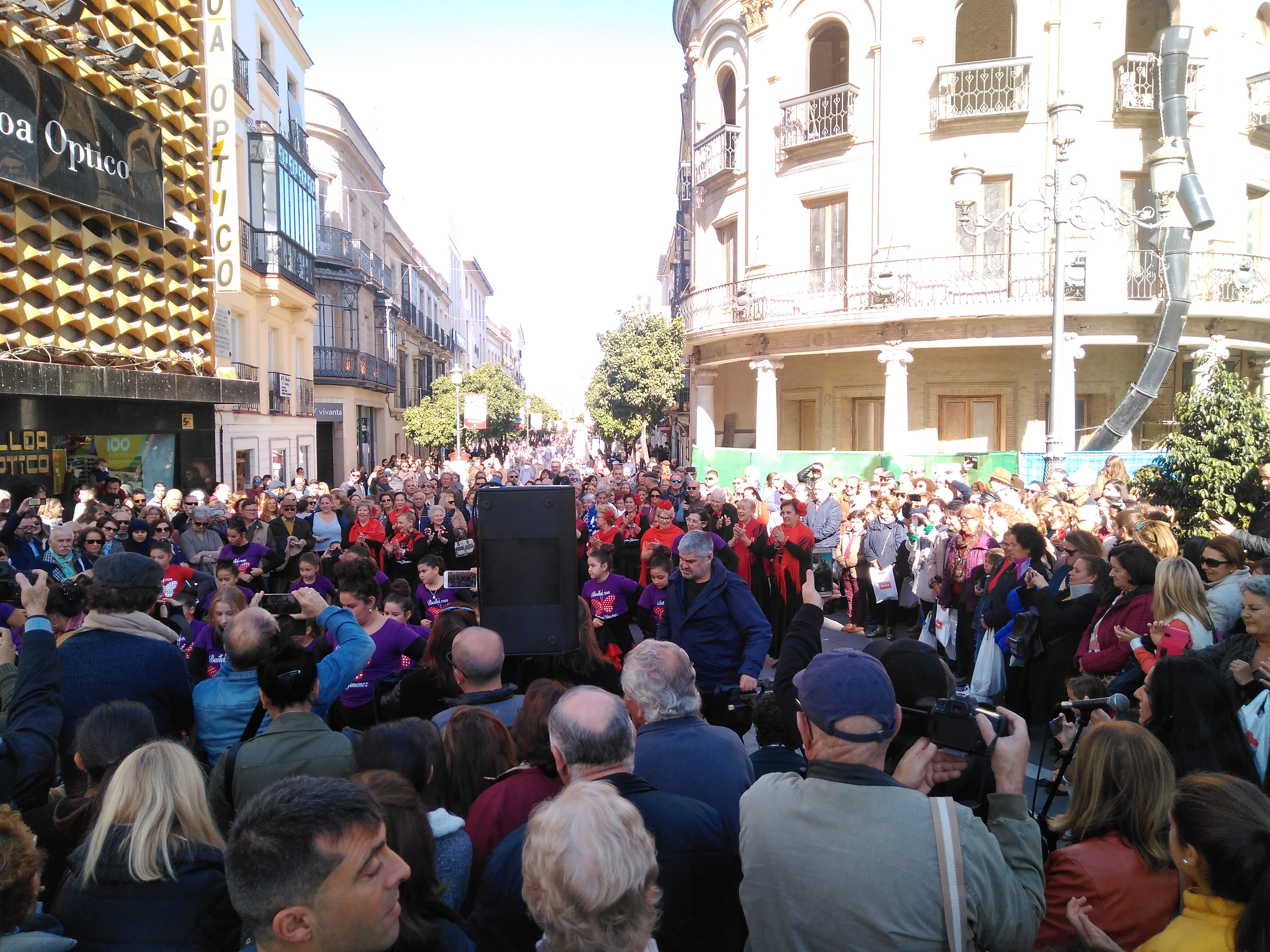 Flashmob flamenco a caro de la academia de Mariam Jiménez en el Gallo Azul con el apoyo de la asociación de comerciantes Acoje. Para celebrar el Día Internacional del Flamenco 2019